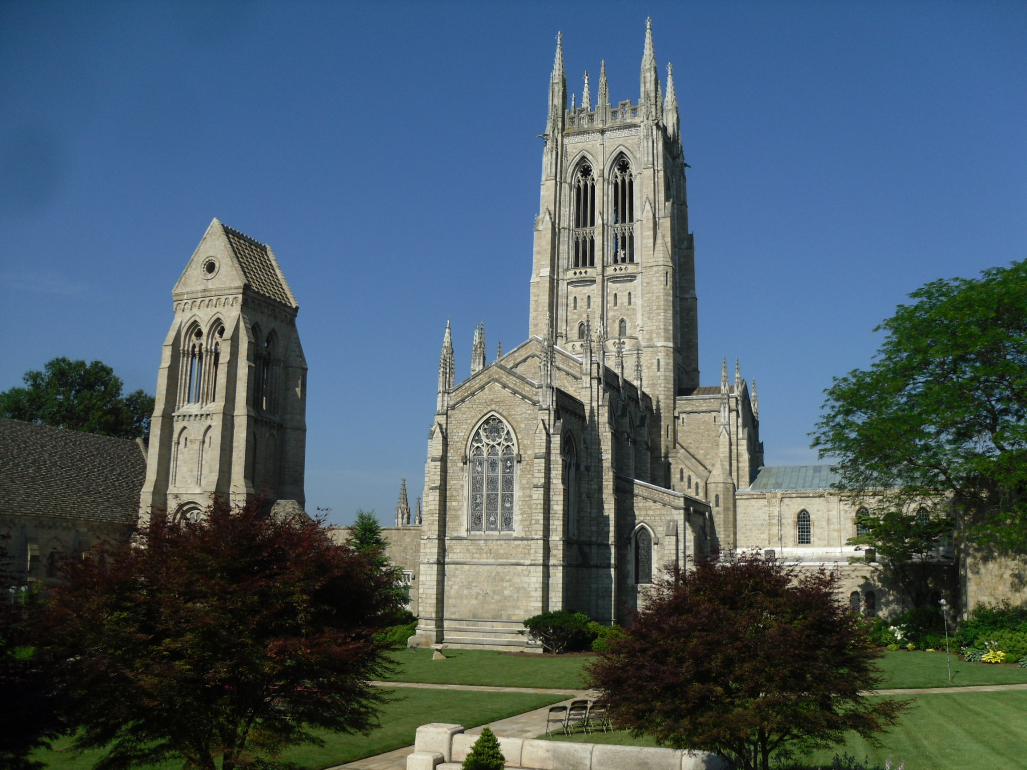 Bryn Athyn Cathedral - Bethayres, Pennsylvania